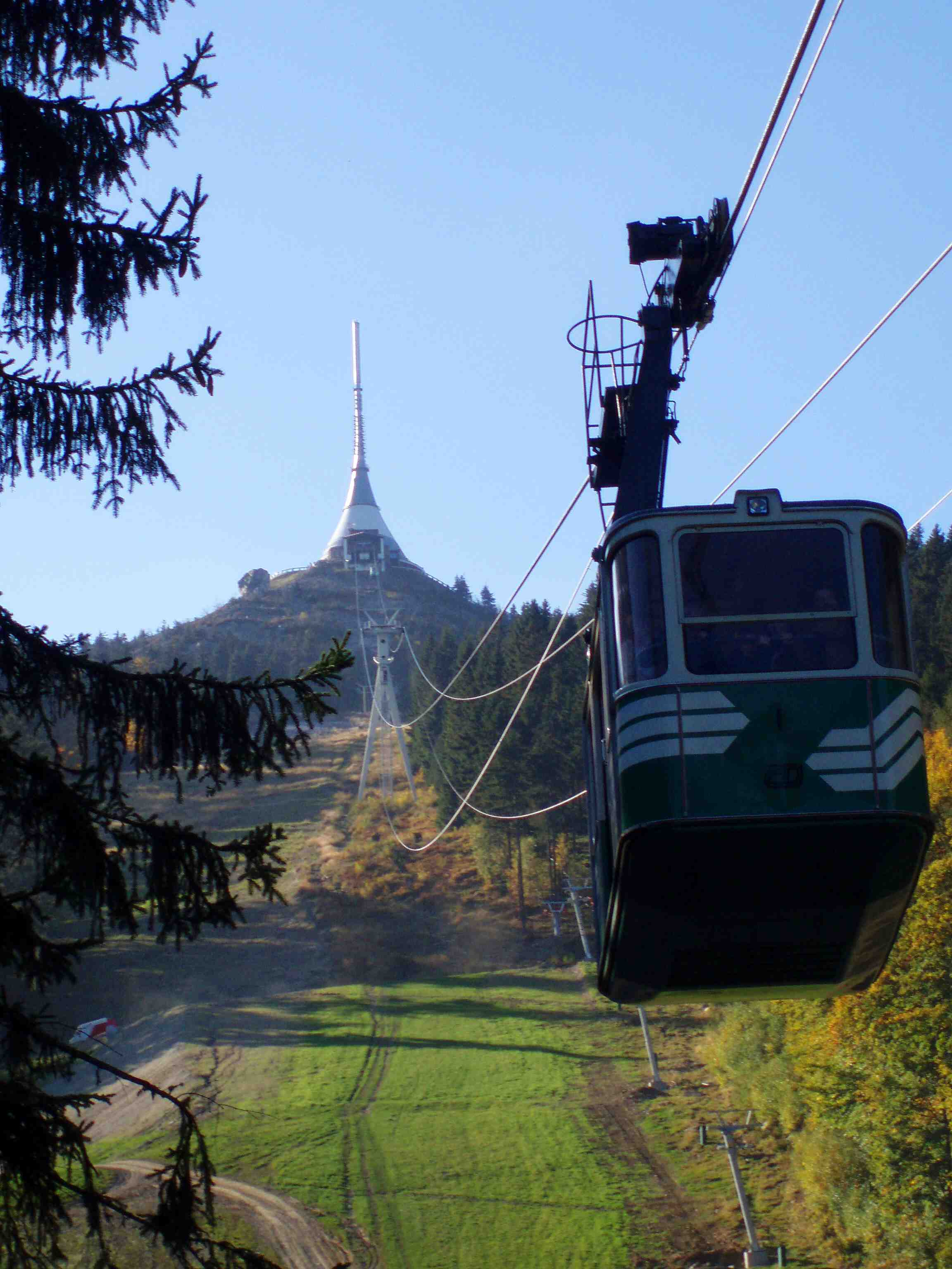 Seilbahn zum Jeschken